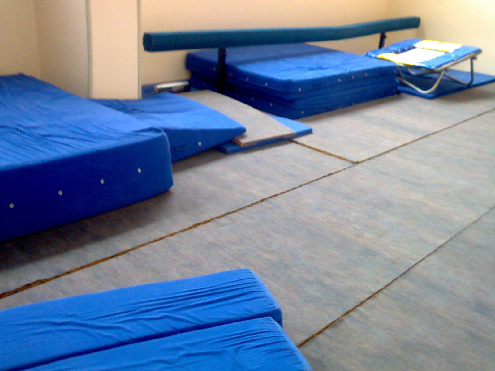 Bilfen Ataşehir İlkokulu, (Bilfen Atasehir Primary School)